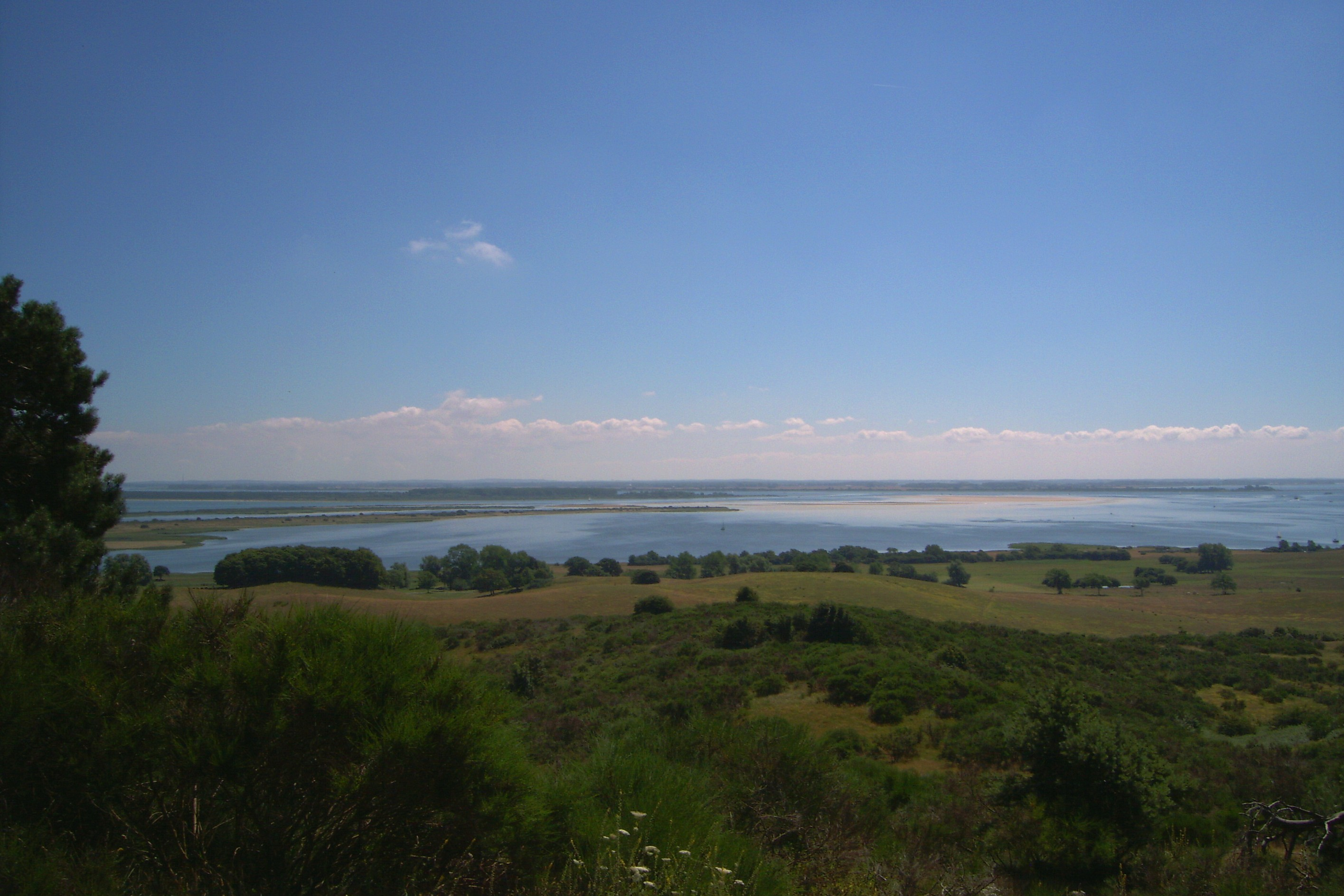 Blick vonm nördlichen Hiddensee nach Rügen 2006 b